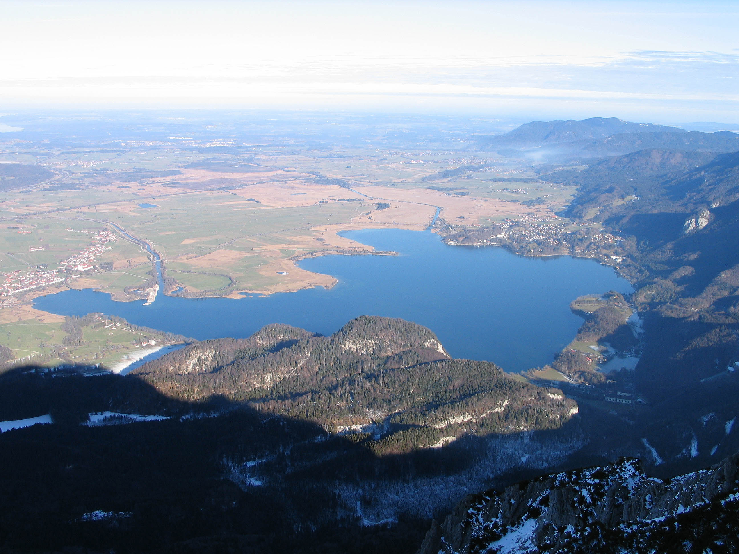 Kochelsee, Bayern Photograph: Luidger (29. Dezember 2006)